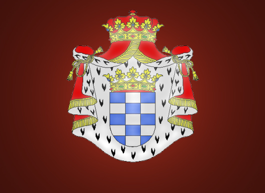 bandera alba de tormes